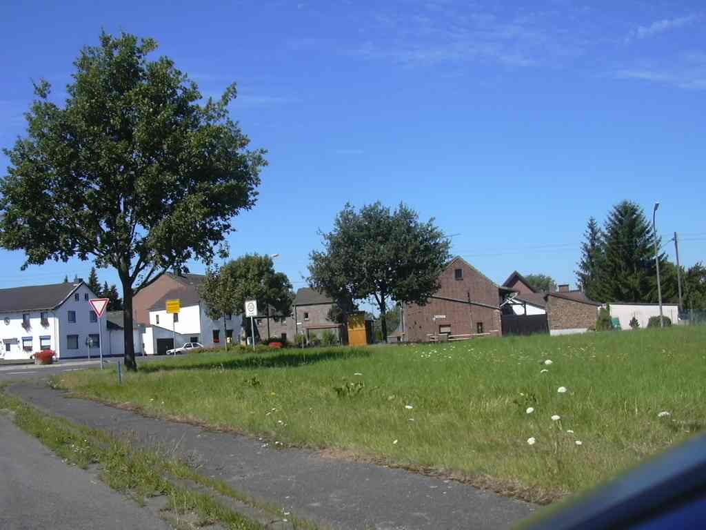 Oberwichterich